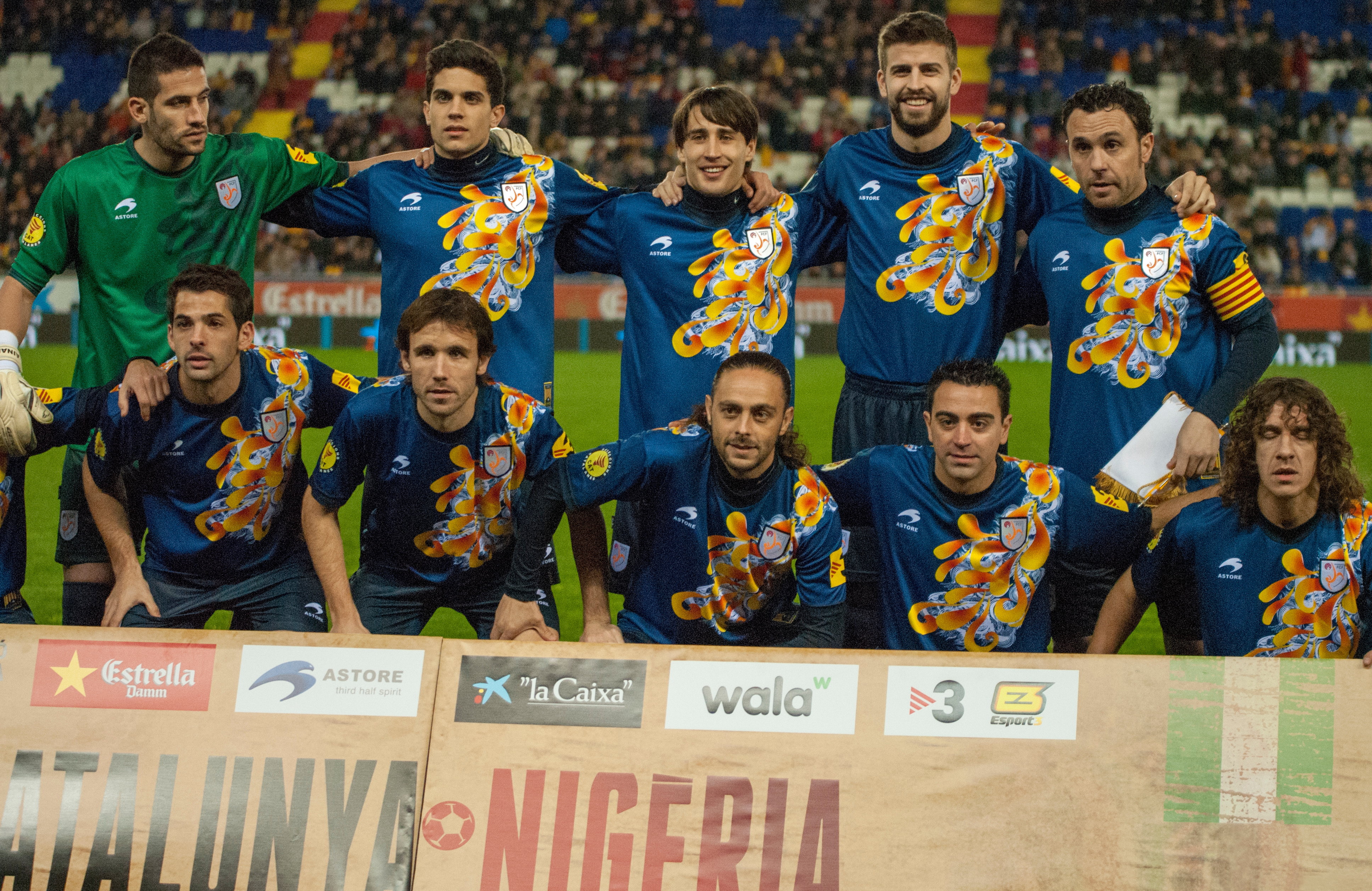 Formació titular de la Selecció catalana, Catalunya Nigèria 2 de gener de 2013.